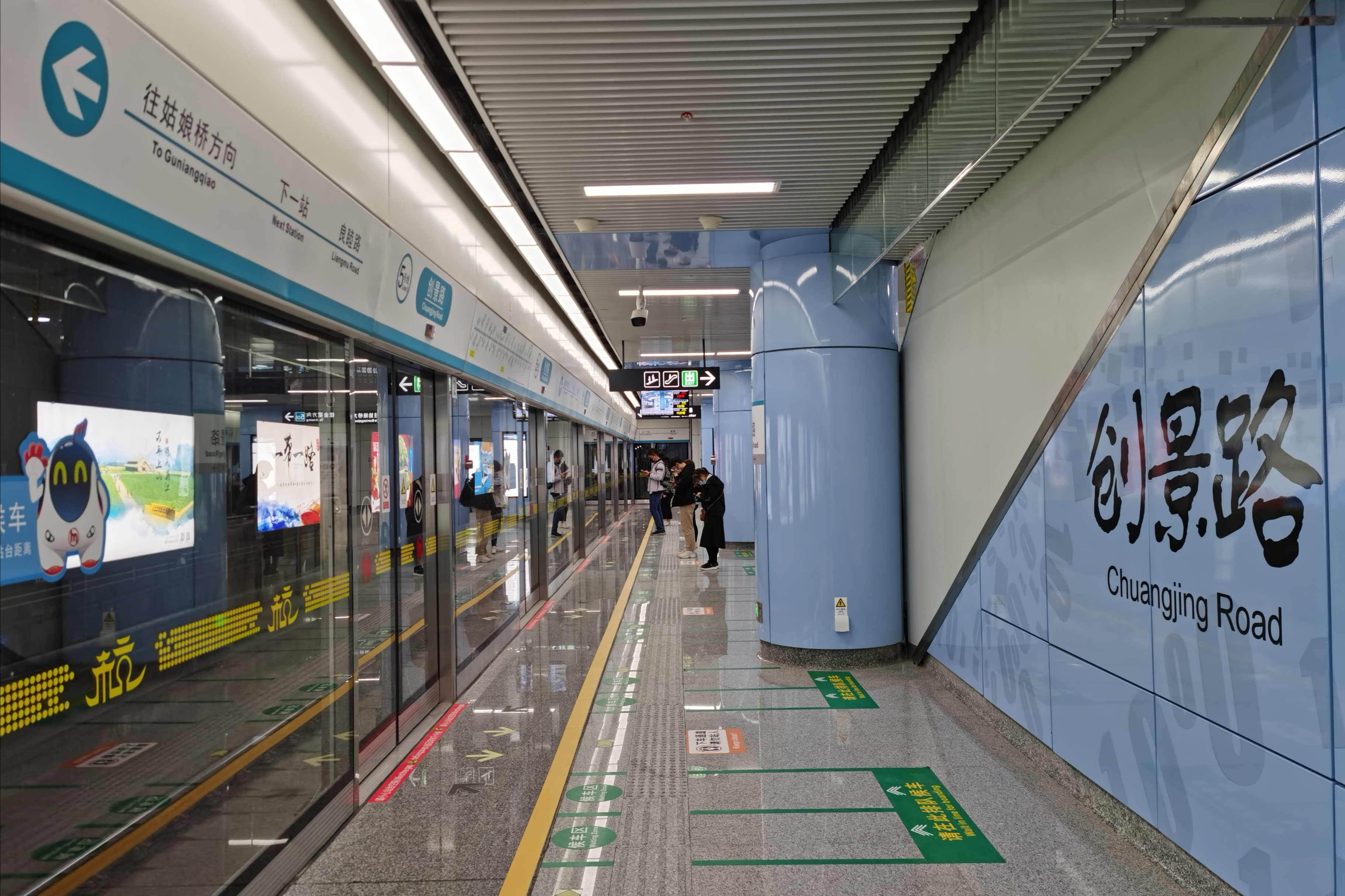 杭州地铁5号线创景路站站台